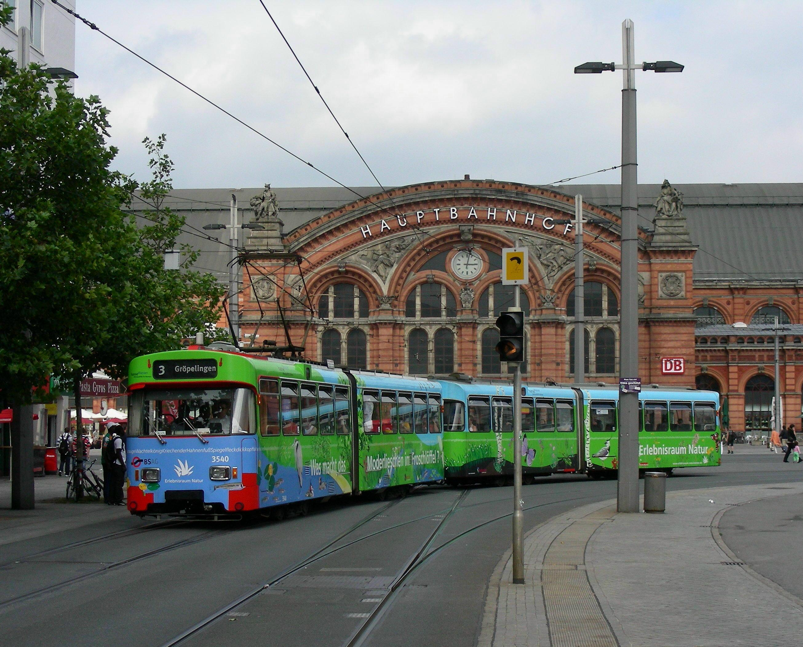 Ein Straßenbahnzug der Bremer Straßenbahn AG vom Typ GT4f vor dem Bremer Hauptbahnhof. Der abgebildete Zug ist seit Juni 2009 nicht mehr im Einsatz. A Tram of the Bremer Strassenbahn AG, model GT4f, in front of Bremen Central Station main entrance. The train shown has been out of service since June 2009.